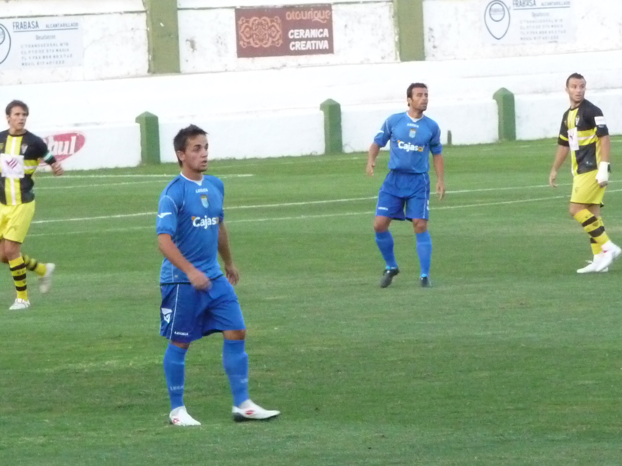 CarlosCalvo-XerezCD-p1040376.jpg